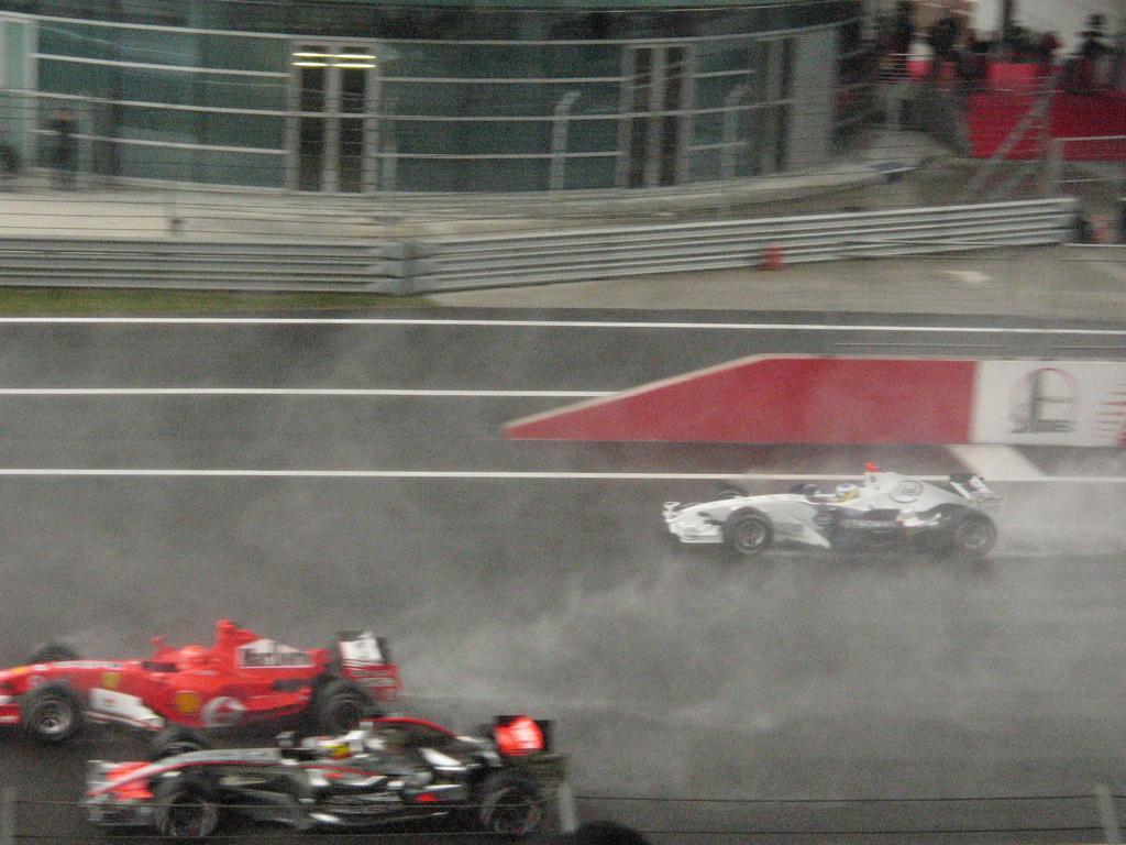 Ferrari (Schumacher), McLaren, BMW, China 2006